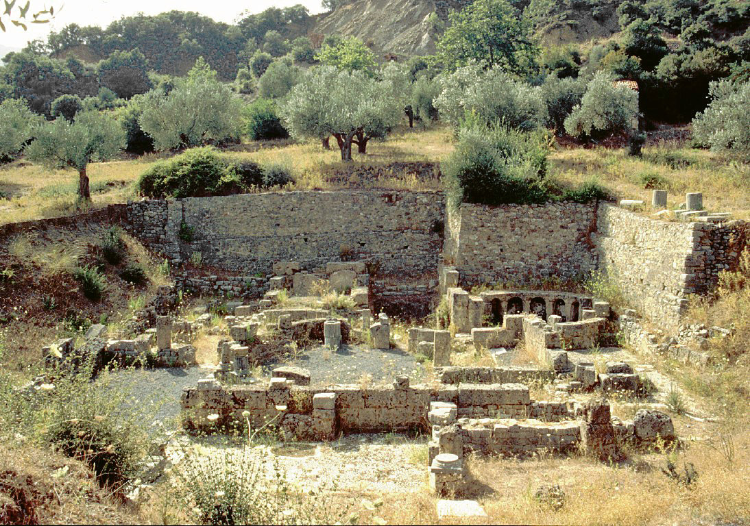 Thermen von Gortys (Arkadin)